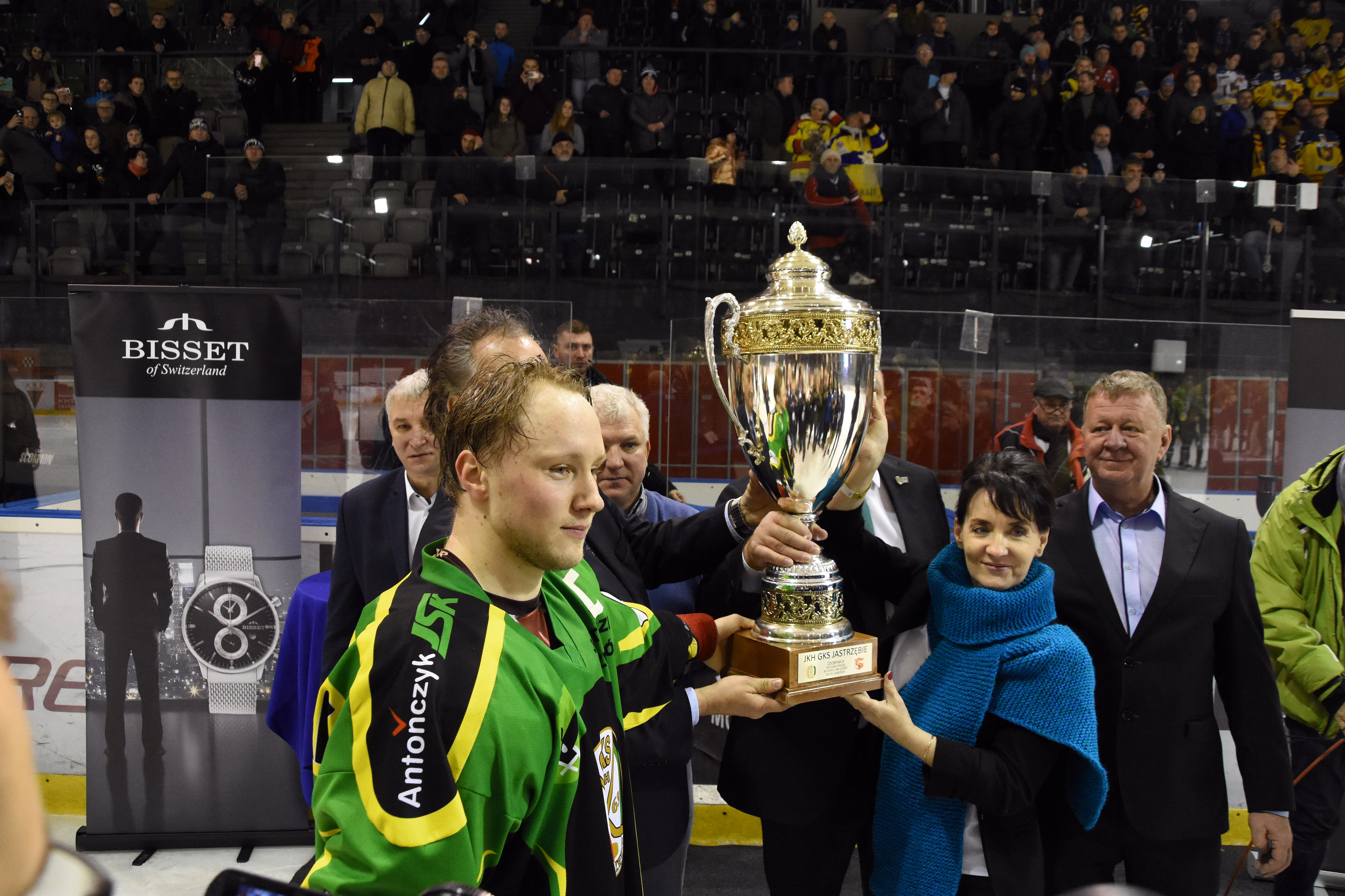 PP JKH Jastrzębie - Podhale Nowy Targ